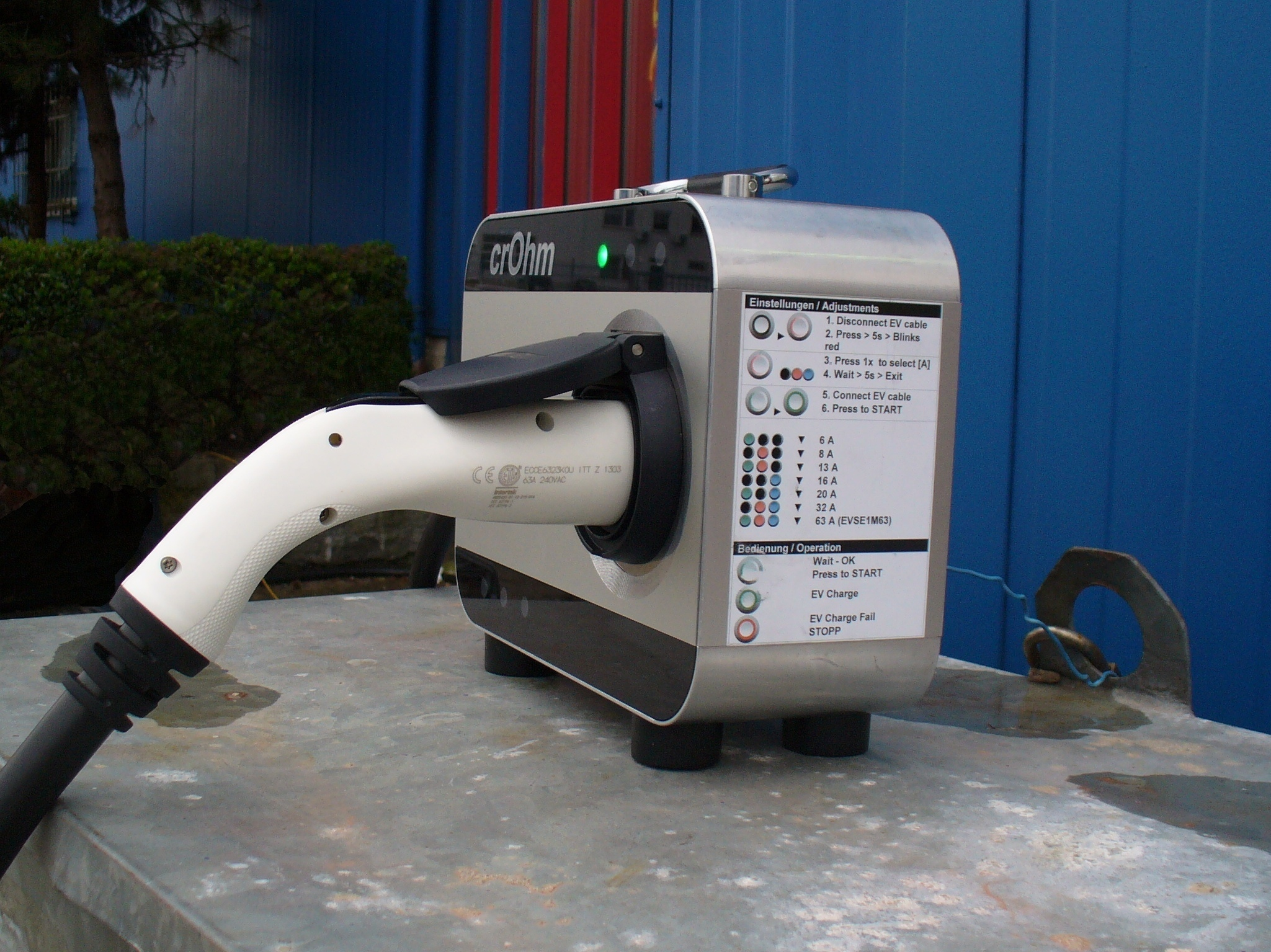 Seitenansicht mobile Wallbox crOhm zum Anschluss Typ2-Ladekabel an Drehstromnetz mit Einstellmöglichkeiten